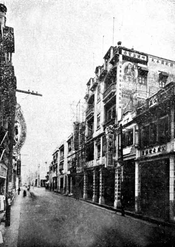 廣州市大新路